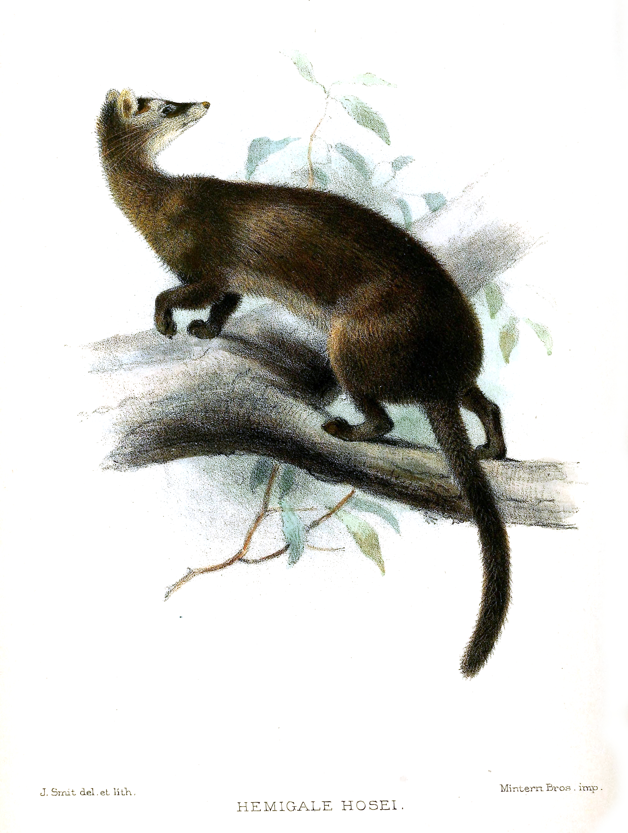 Hemigale hosei = Diplogale hosei